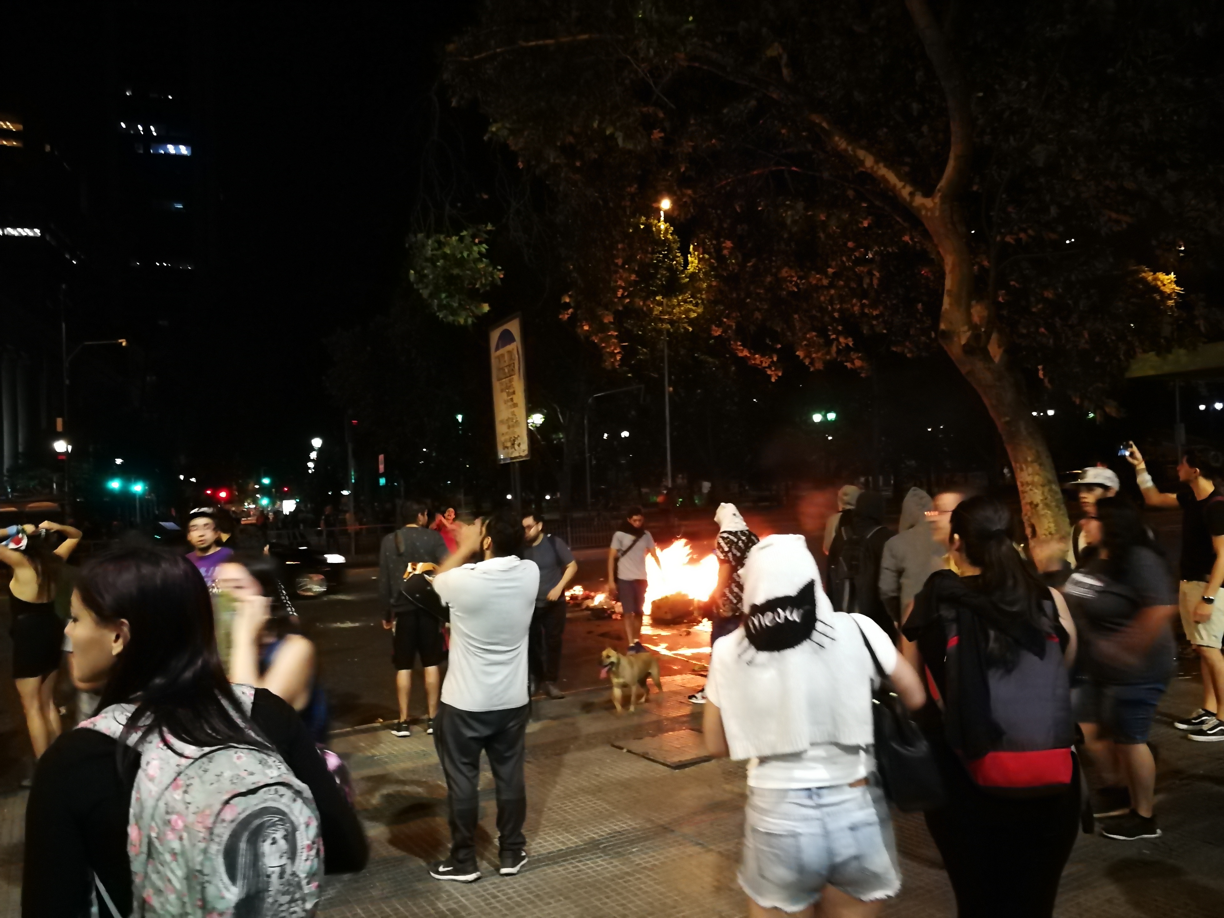 Protestas en Santiago de Chile por el asesinato del mapuche Camilo Catrillanca.